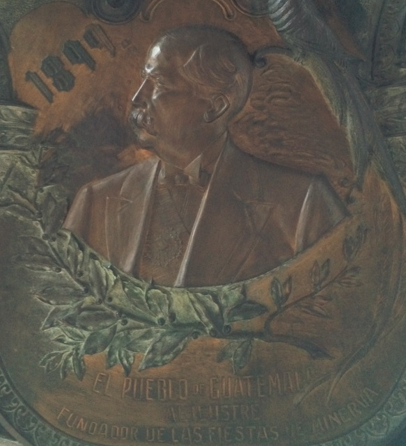 Medallon de Estrada Cabrera, en conmemoracion del décimoquinto aniversario de las Fiestas de Minerva.